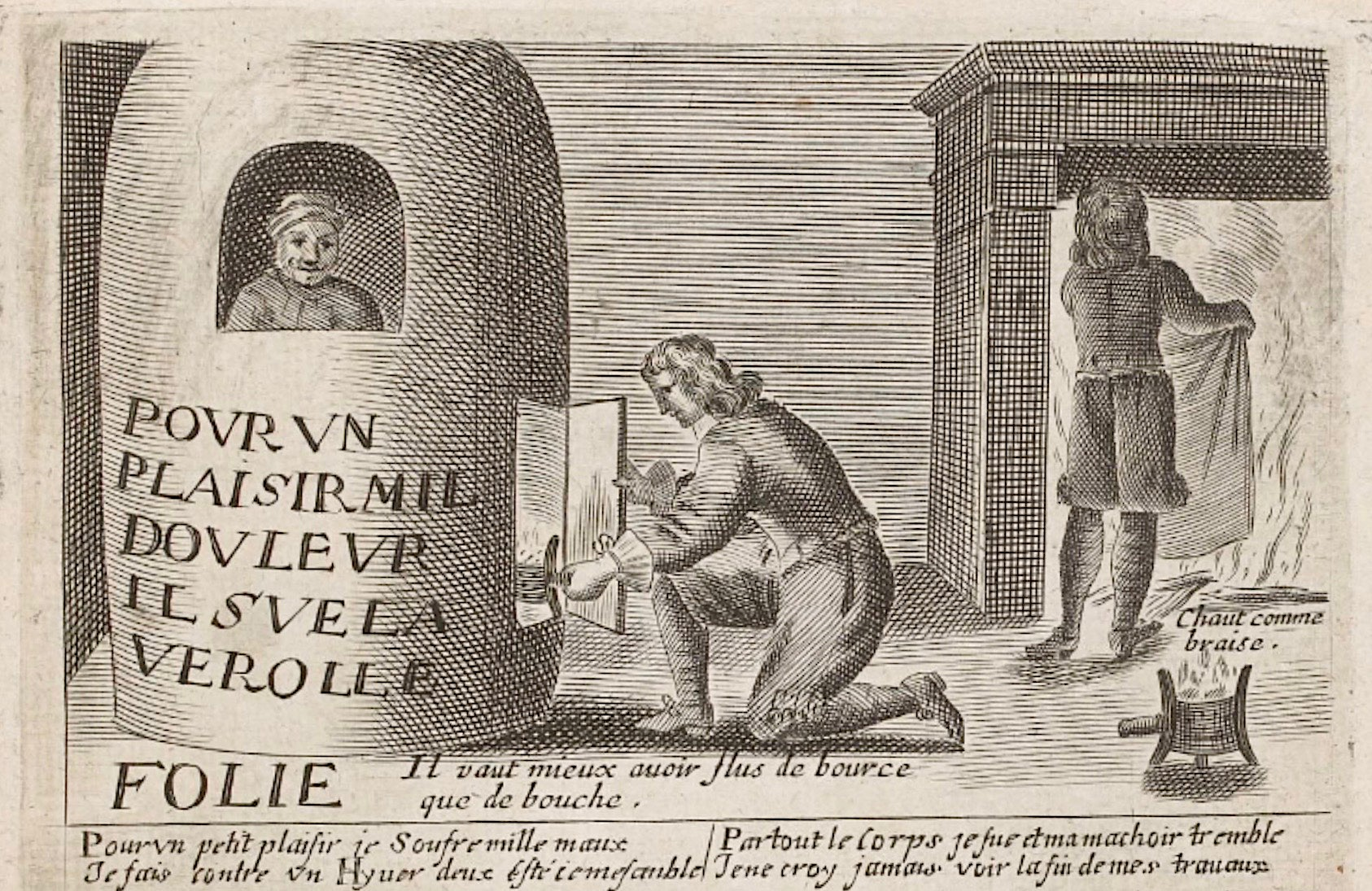 Bild aus Recueil des plus illustres proverbes divisés en trois livres); Behandlung mit Quecksilberdämpfen